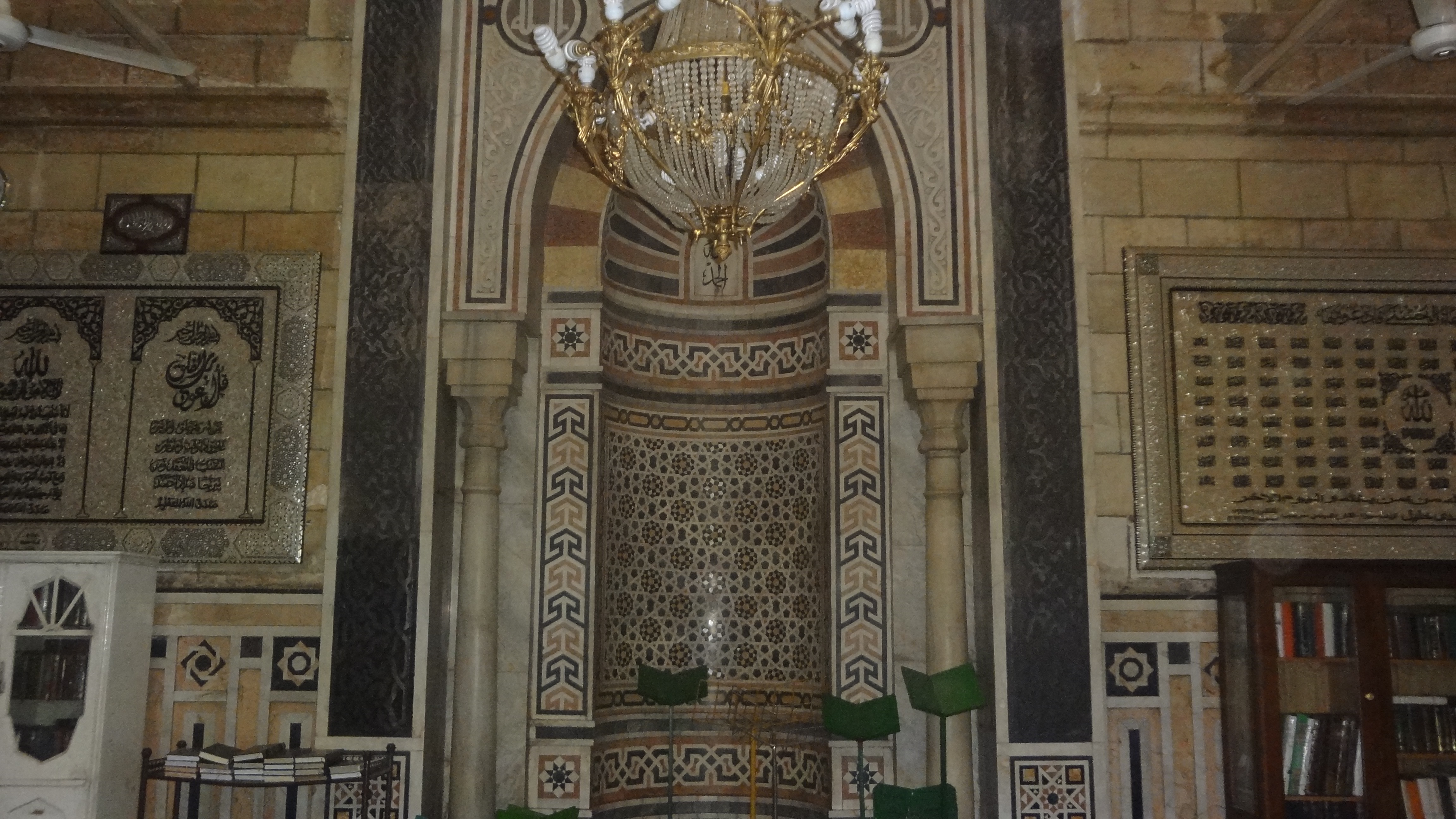 محراب مسجد السيدة زينب بالقاهرة